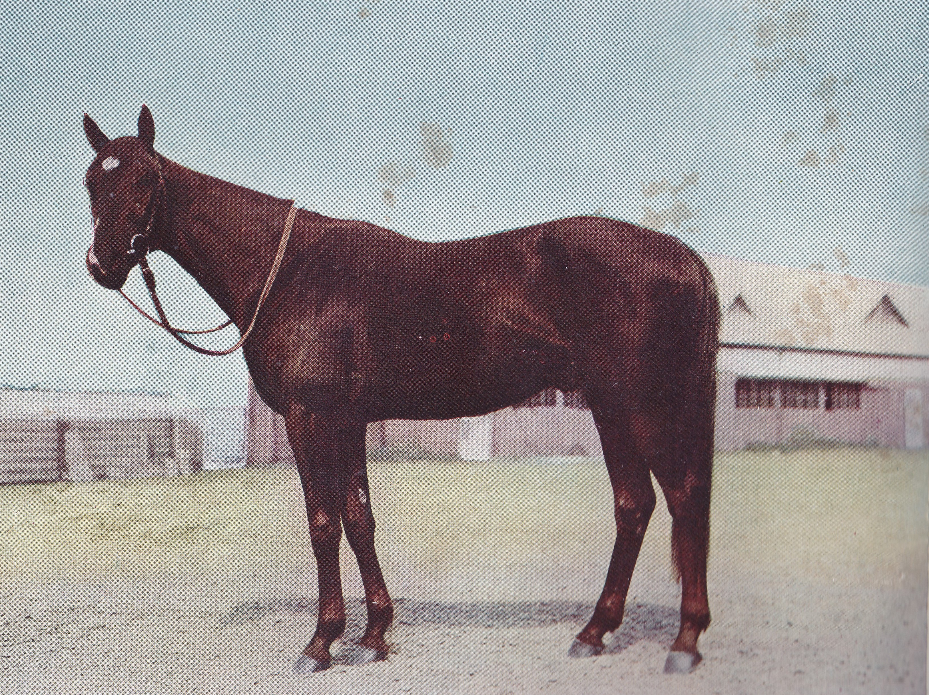 フレーモア